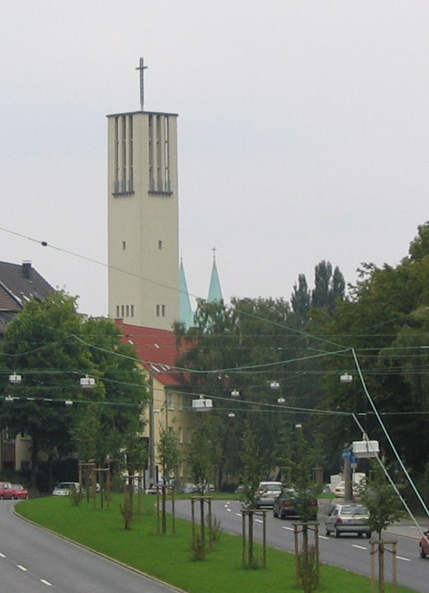 Dortmund Nikolaikirche